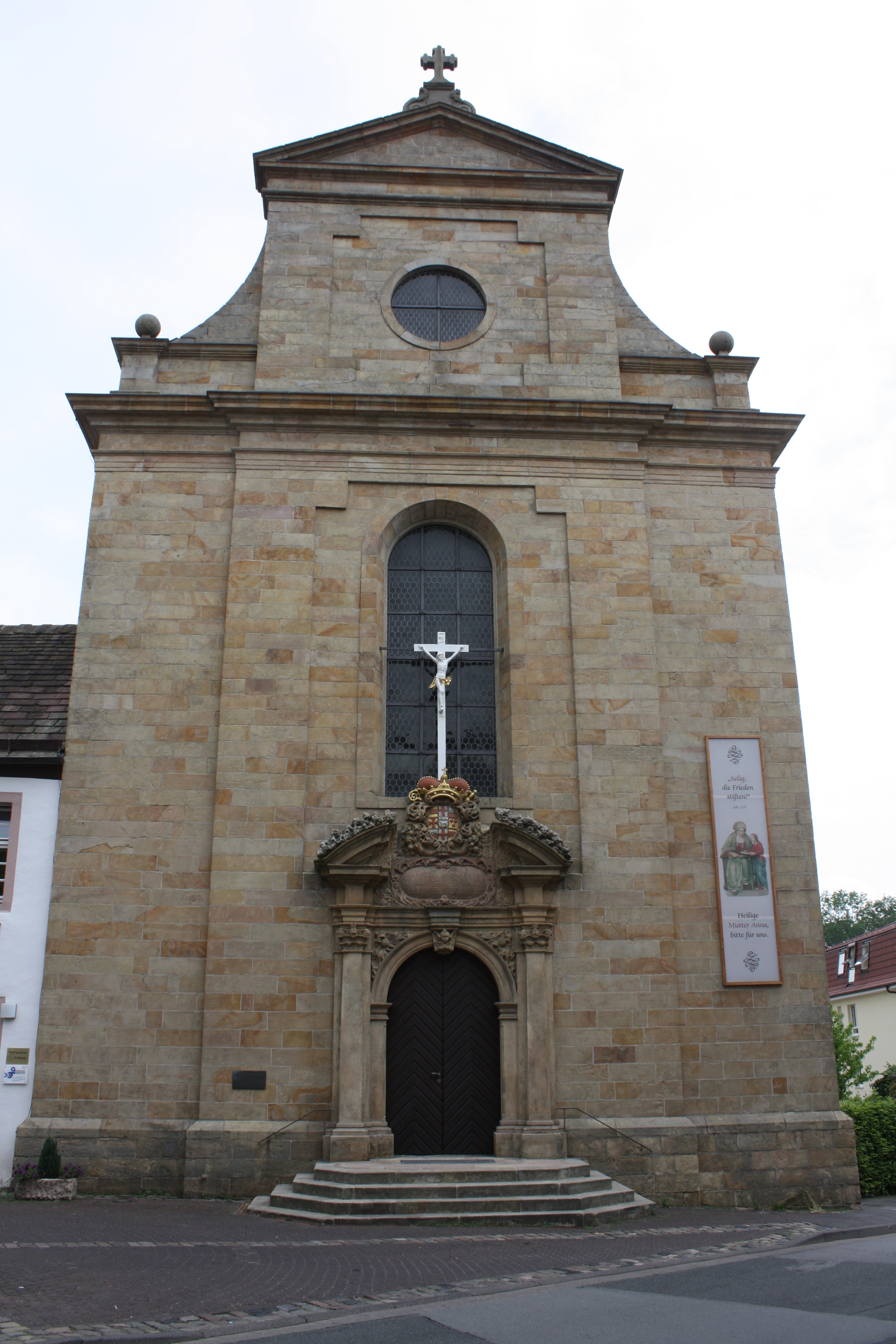 Kapuzinerkirche in Brakel, erbaut 1715-1719 von Johann Conrad Schlaun